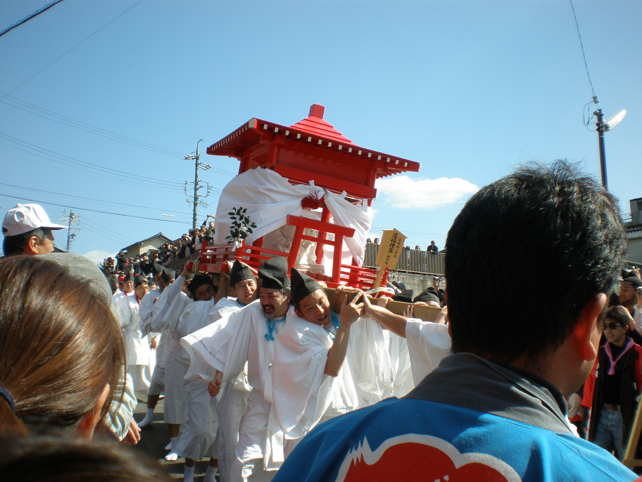 愛知県小牧市の田縣神社で行われる豊年祭